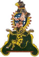 El jeroglífico de Tehuantepec, es un fragmento de la fundación llamada códice de Guevea o códice Zapoteca, en el escudo se aprecia un montículo con un Jaguar. En el montículo se encuentran 66 divisiones y en cada división un círculo, en esta forma se pintó el amurallamiento del cerro de Guie-Ngola en medio del montículo se pinta un jaguar o tigre, así lo describieron los tenochcas por la fiereza con que el ejército zapoteca defendía la fortificación y al mismo tiempo abre sus fauces para tragar a un ser amorfo que se encuentra dentro e una rodela o escudo azteca, con espacios rectangulares que pueden significar aposentos reales; la figura amorfa es el ejército tenochcas que pierde la batalla ante el ejército zapoteca, y en la cúspide de la rodela se aprecia el águila real que simboliza el poderío del reino azteca; y en su pico sostiene un lazo con borla para no permitir que el ser amorío sea tragado por el jaguar o tigre.